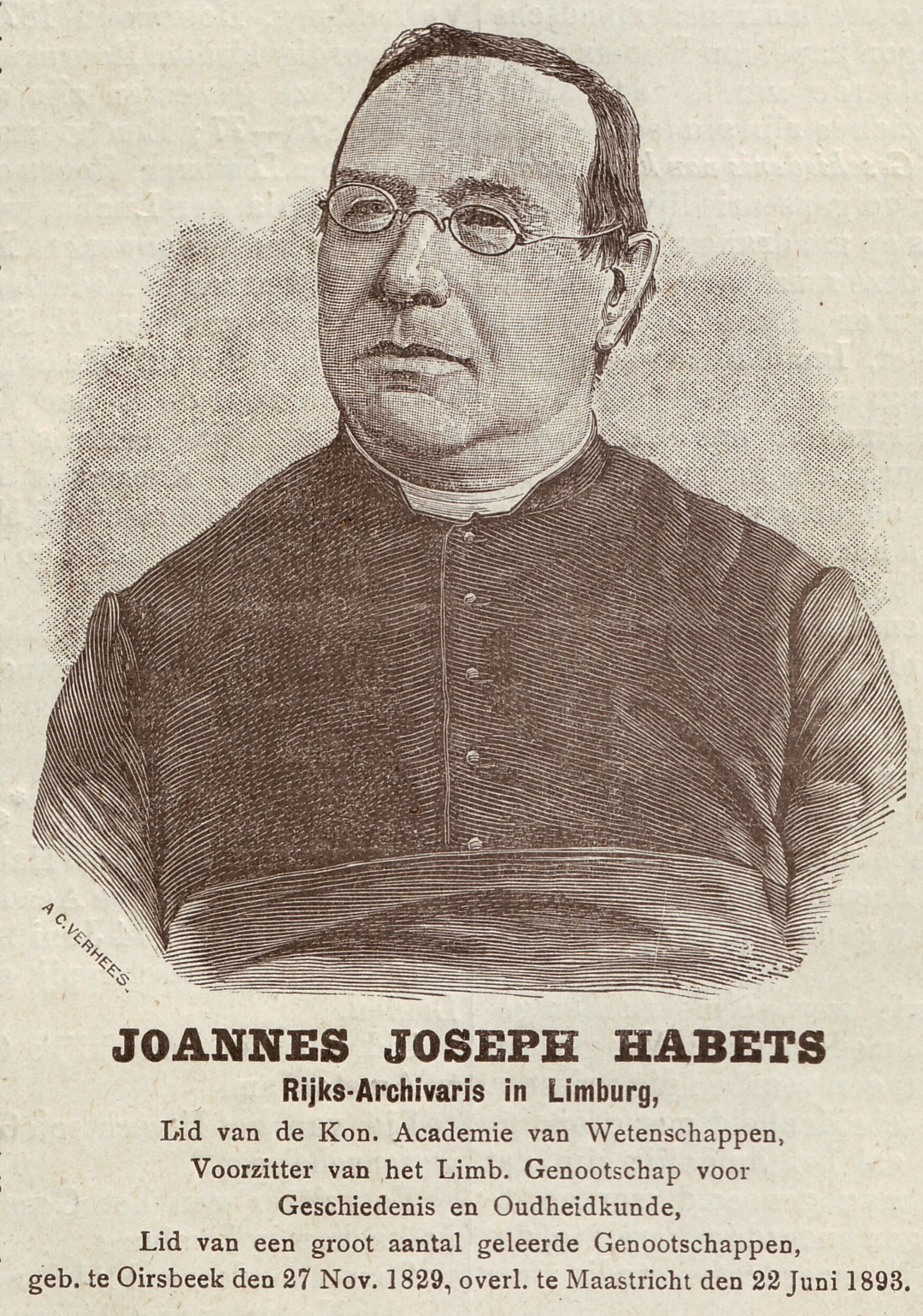 Pentekening in Maasgouw van 1 augustus 1893 van Jozef Habets